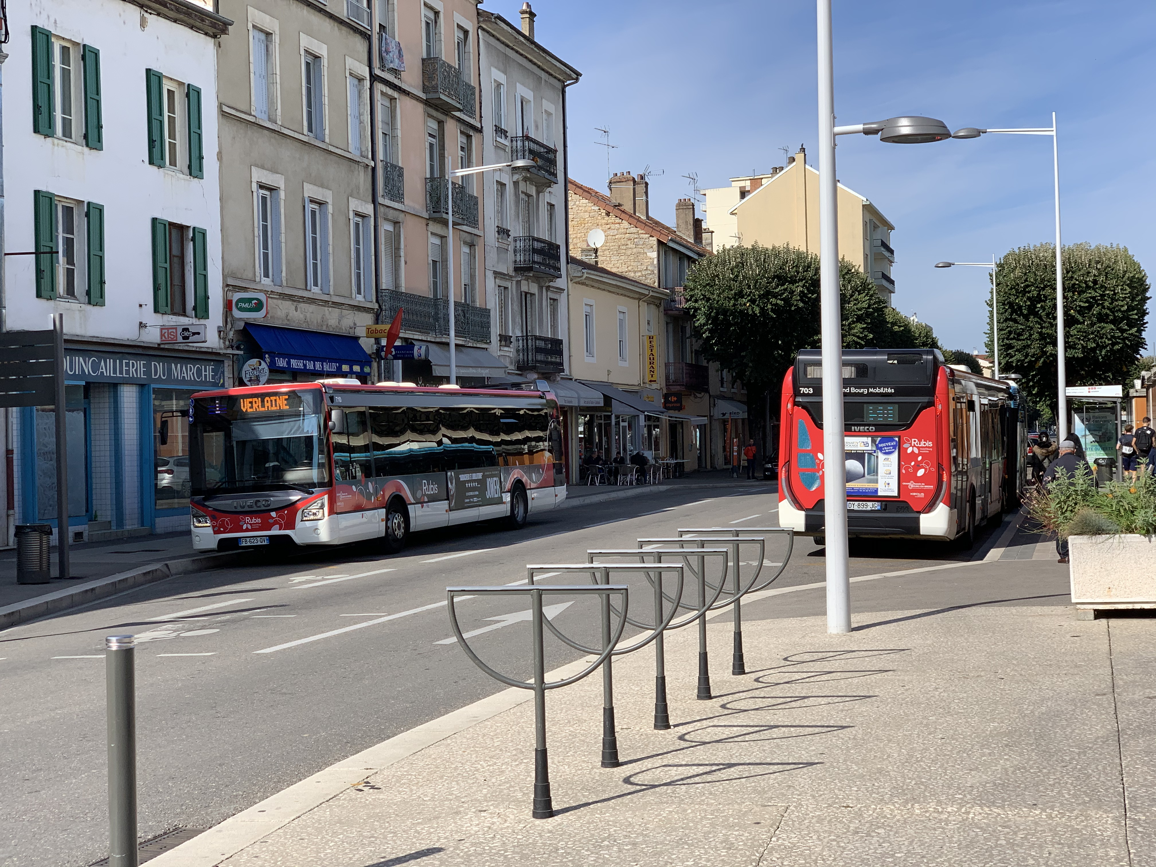 Bus du réseau Rubis sur l'avenue Maginot, Bourg-en-Bresse.